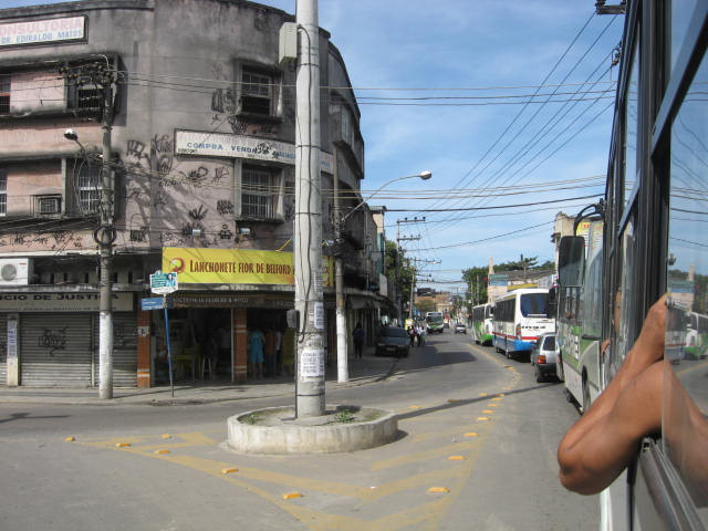 Centro de Belford Roxo, estado do Rio de Janeiro, Brasil.